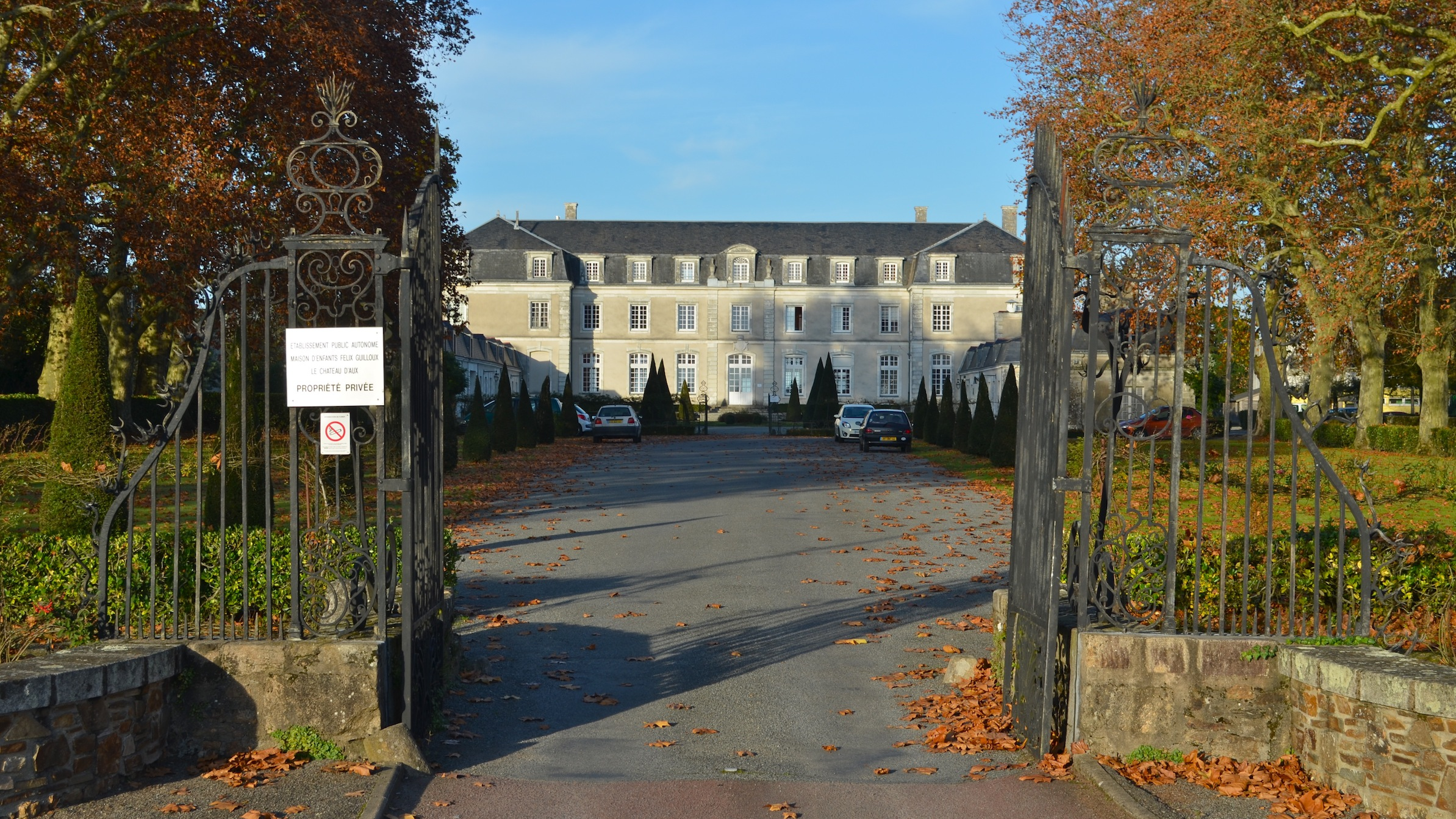 Château d'Aux - La Montagne (Loire-Atlantique)